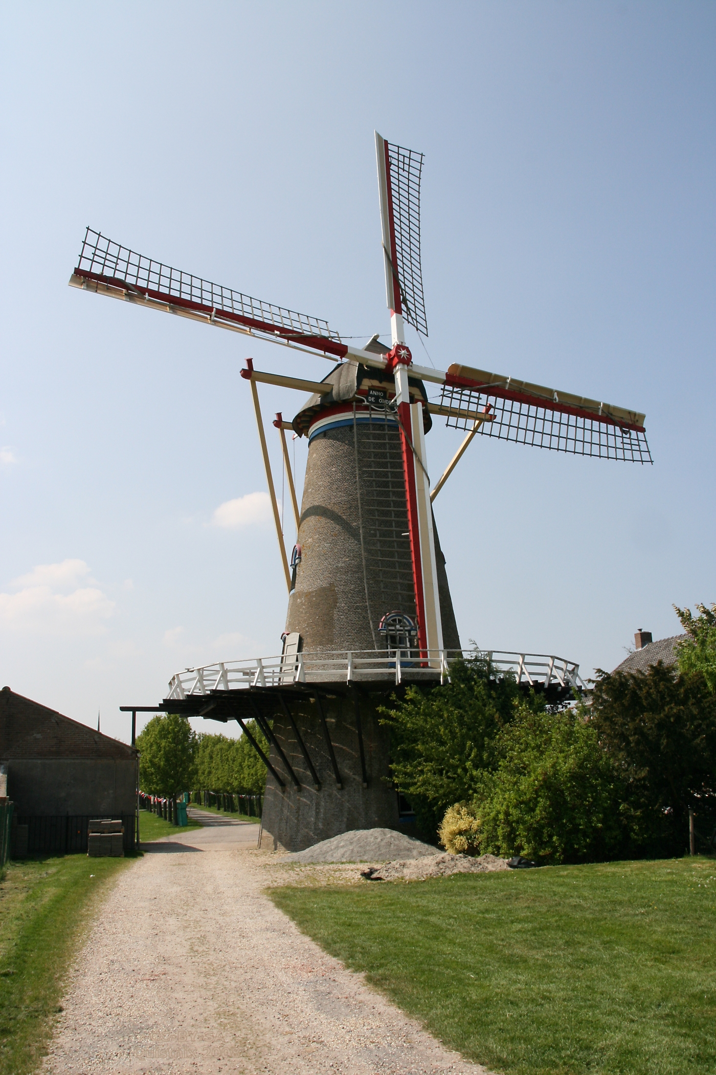 Wissenkerke: Korenmolen De Onderneming